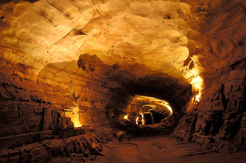 Phong Nha Ke Bang, Quang Binh, Vietnam